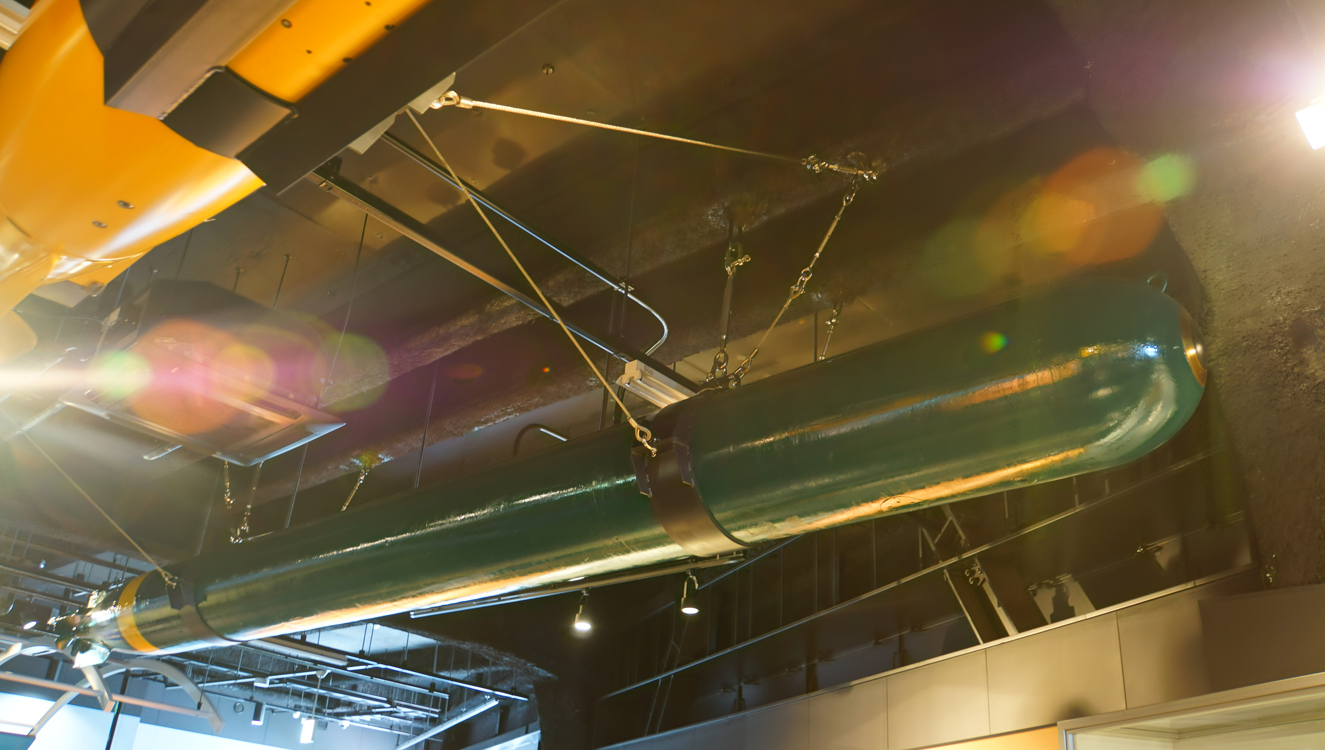 海上自衛隊 54式魚雷3型改1。 14年9月15日 海上自衛隊呉史料館内にて。